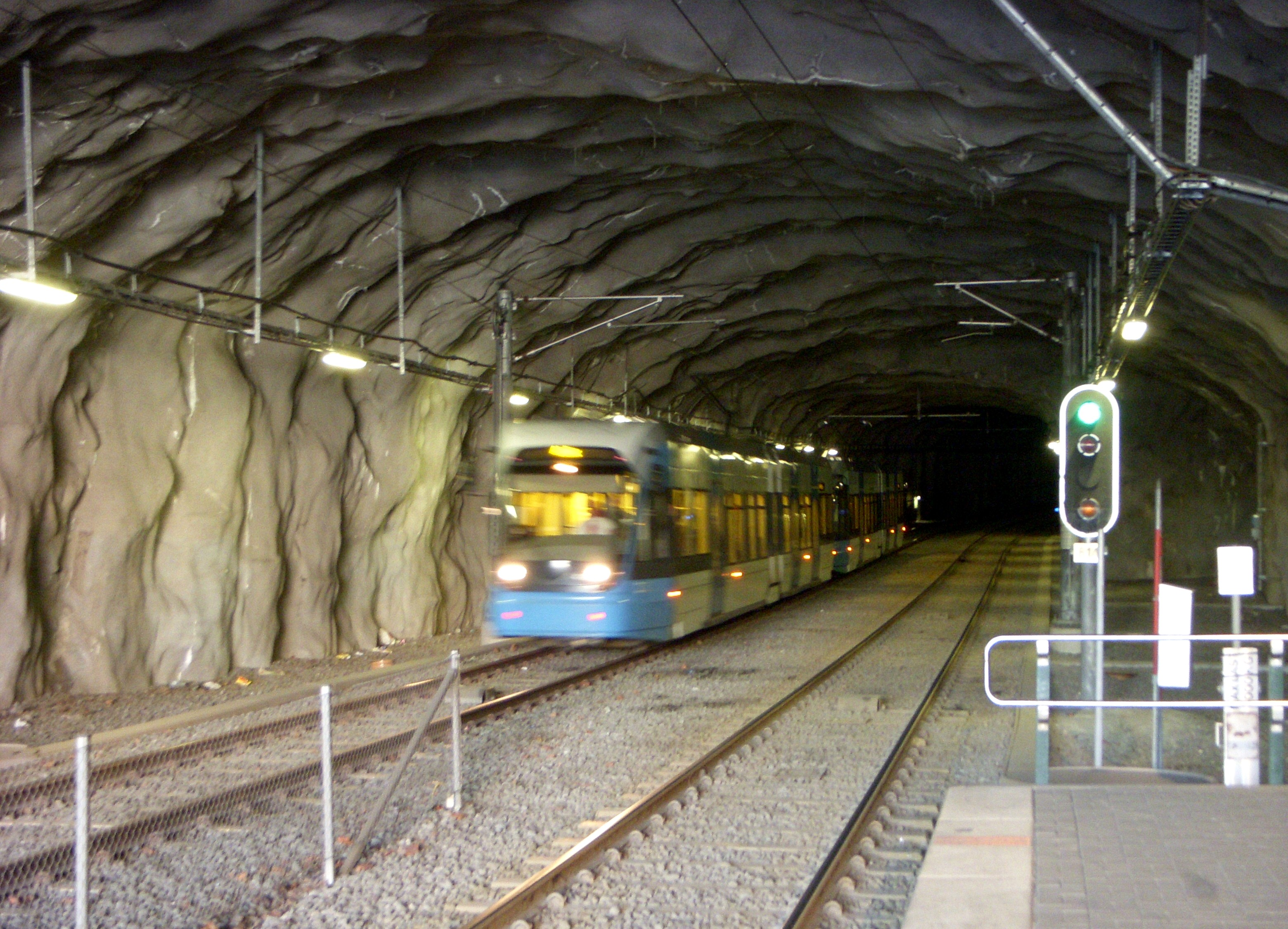 Årstadal, Stockholm, Tvärbanans hållplats